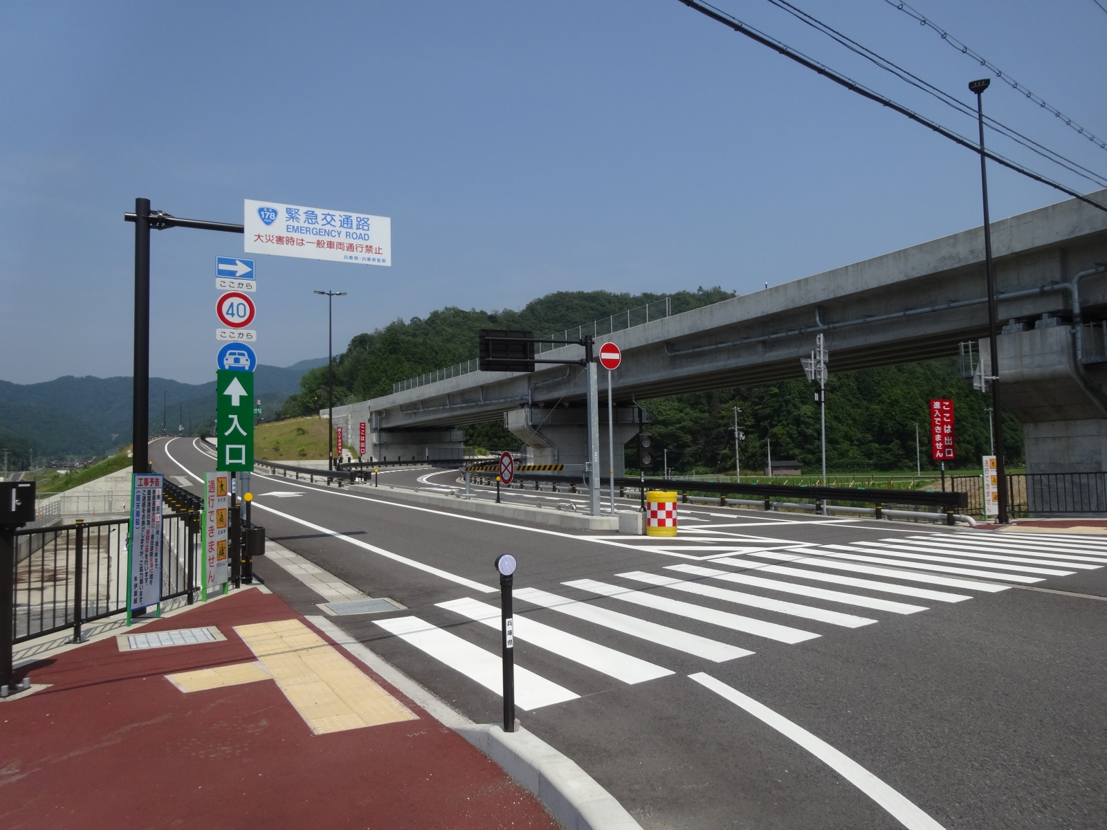 久斗インターチェンジ